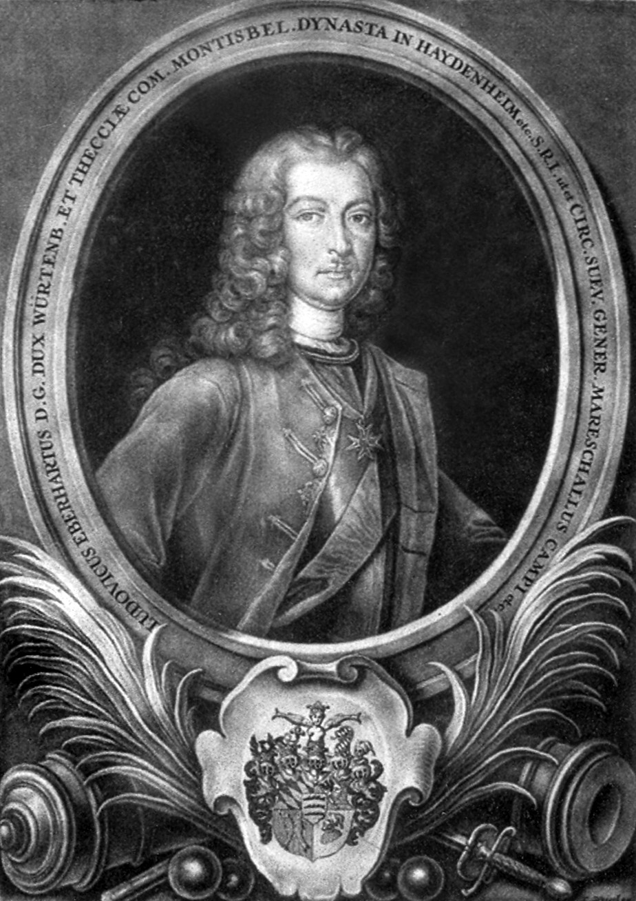 Herzog Eberhard Ludwig von Württemberg (1676-1733)